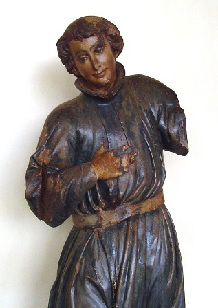 Santo2